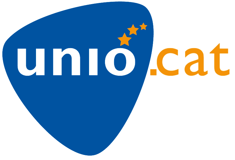 Logo de UDC del 2015